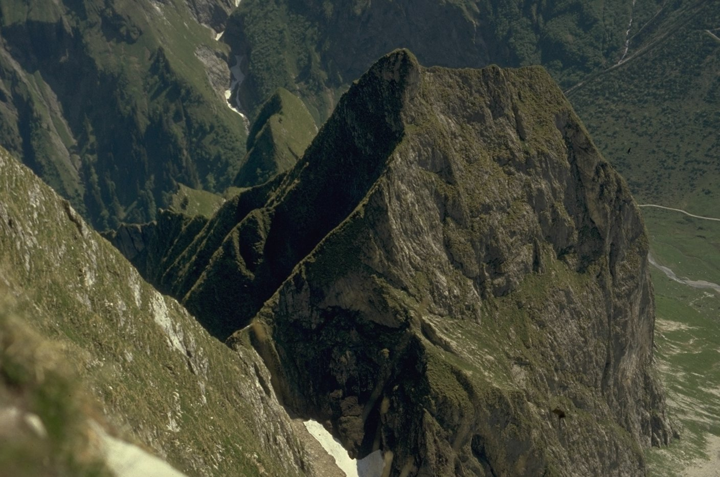 Kleine Höfats vom Gipfel des Höfats-Ostgipfels